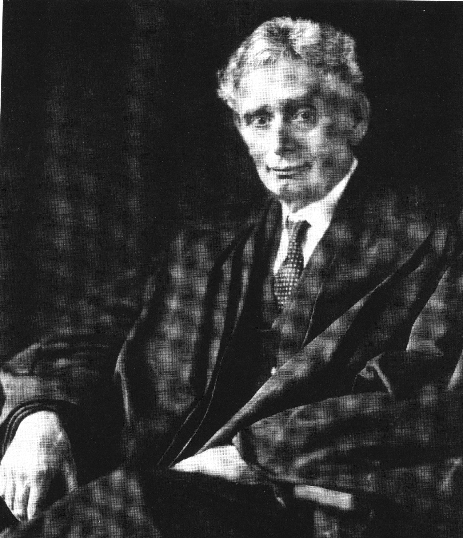 ב1916 מינה הנשיא וילסון את ברנדייס כשופט בית המשפט העליון.הוא היה היהודי הראשון שזכה לשבת בבית המשפט האמריקאי.